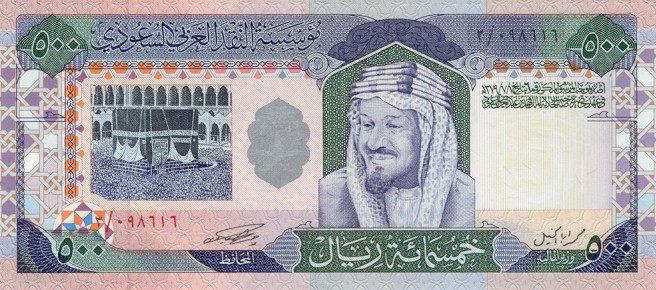 500 риалов. Саудовская Аравия, обр. 1983. Аверс.